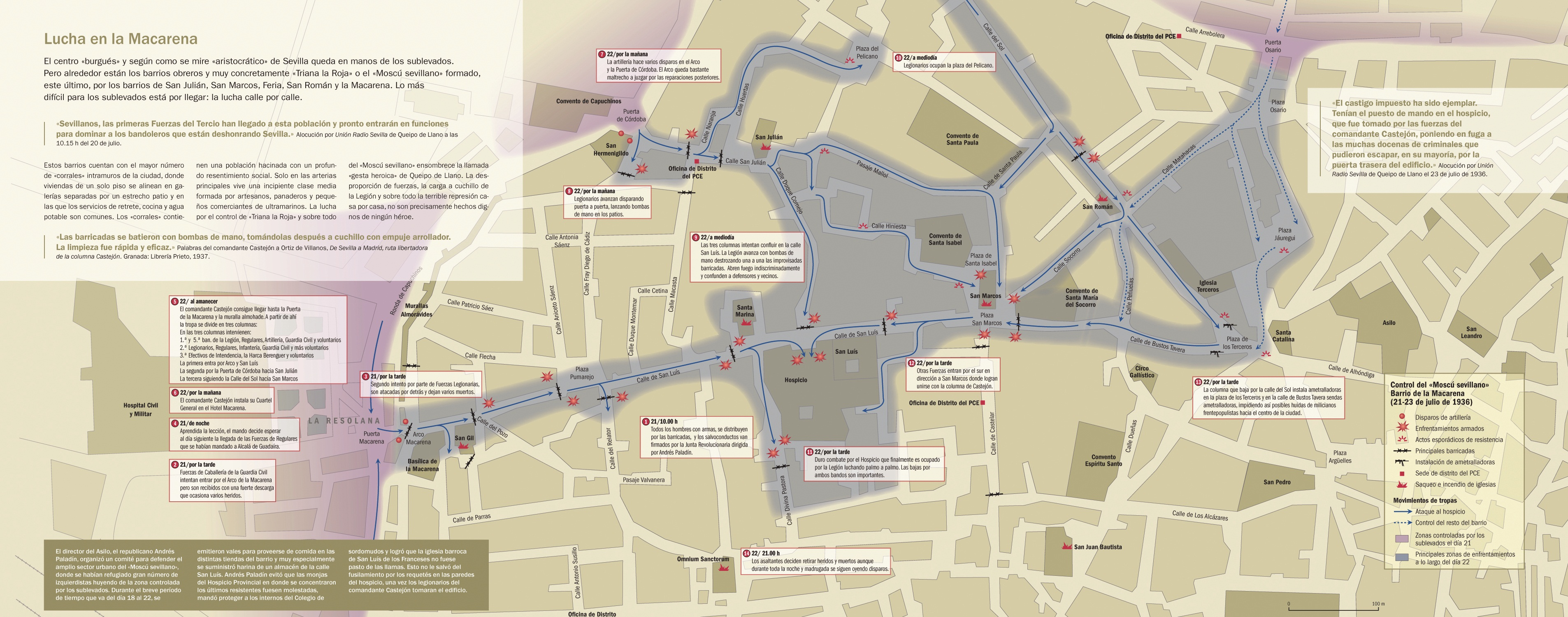 Infografía que narra el asalto de los sublevados a la Macarena y barrios adyacentes los días 21 y 22 de julio de 1936. Páginas 34, 35 y 36 del libro "La sublevación", de Víctor Hurtado (DAU, 2011). Tríptico desplegable.